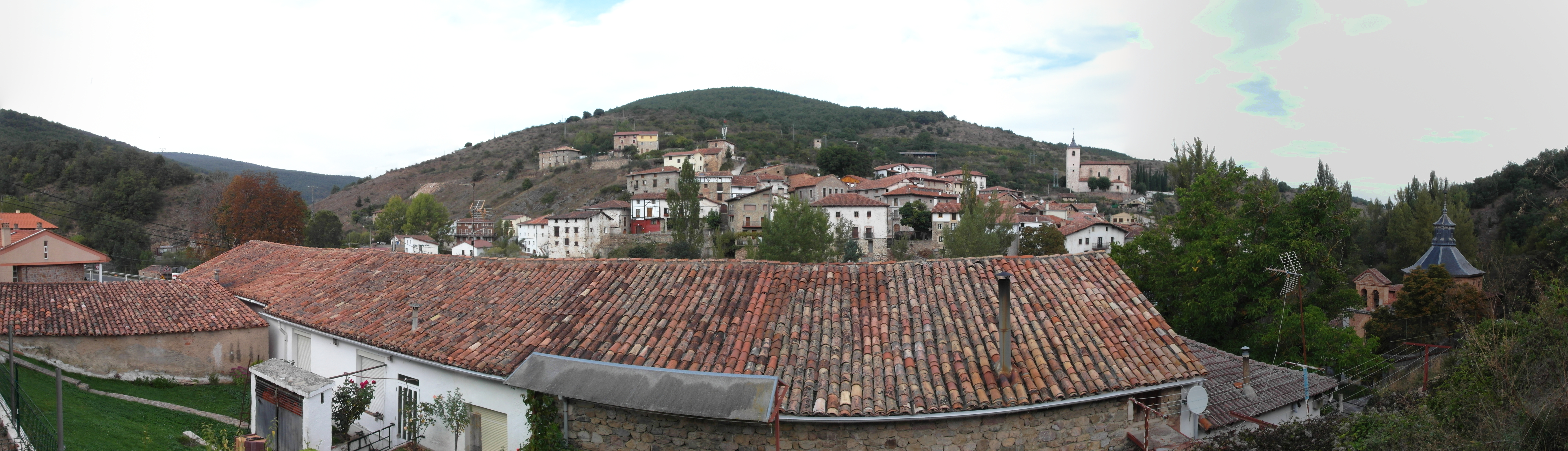 Villanueva de Cameros, La Rioja.